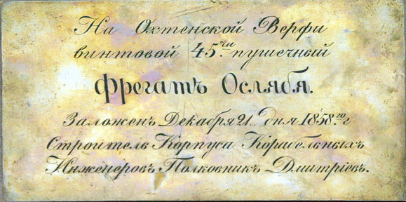 Закладная доска фрегата "Ослябя", хранится в Центральном военно-морском музее